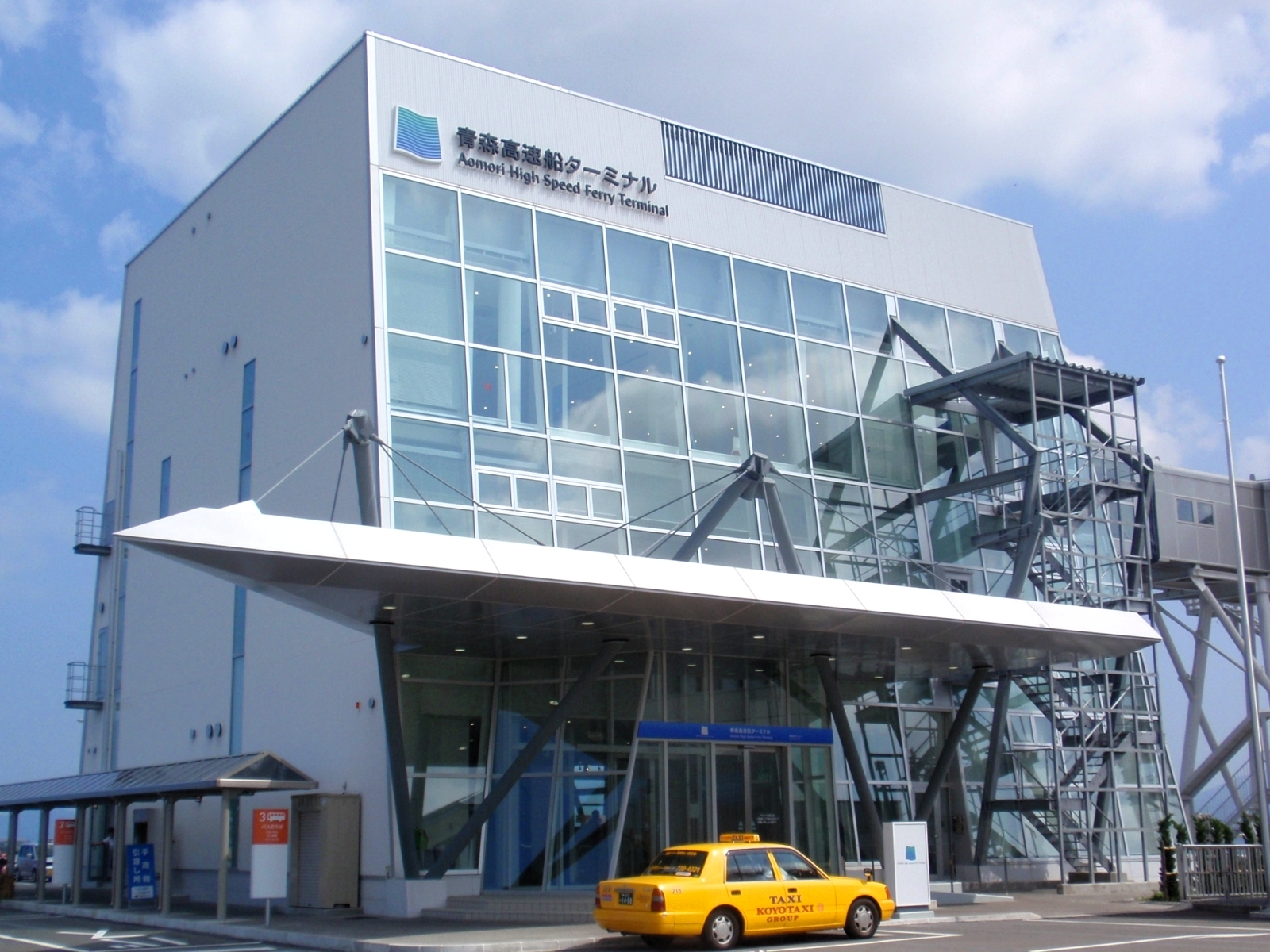 青森高速船ターミナル